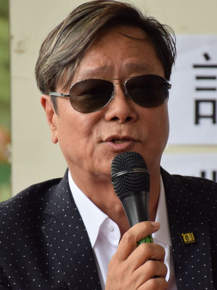 本土派的普羅政治學苑召集人黃毓民表示，今年六四將會舉辦18區悼念活動。